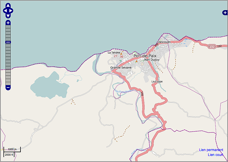 Cours de la rivière "Trois Rivières", Haïti, département Nord. Capture d'écran à partir de OpenStreetMap.